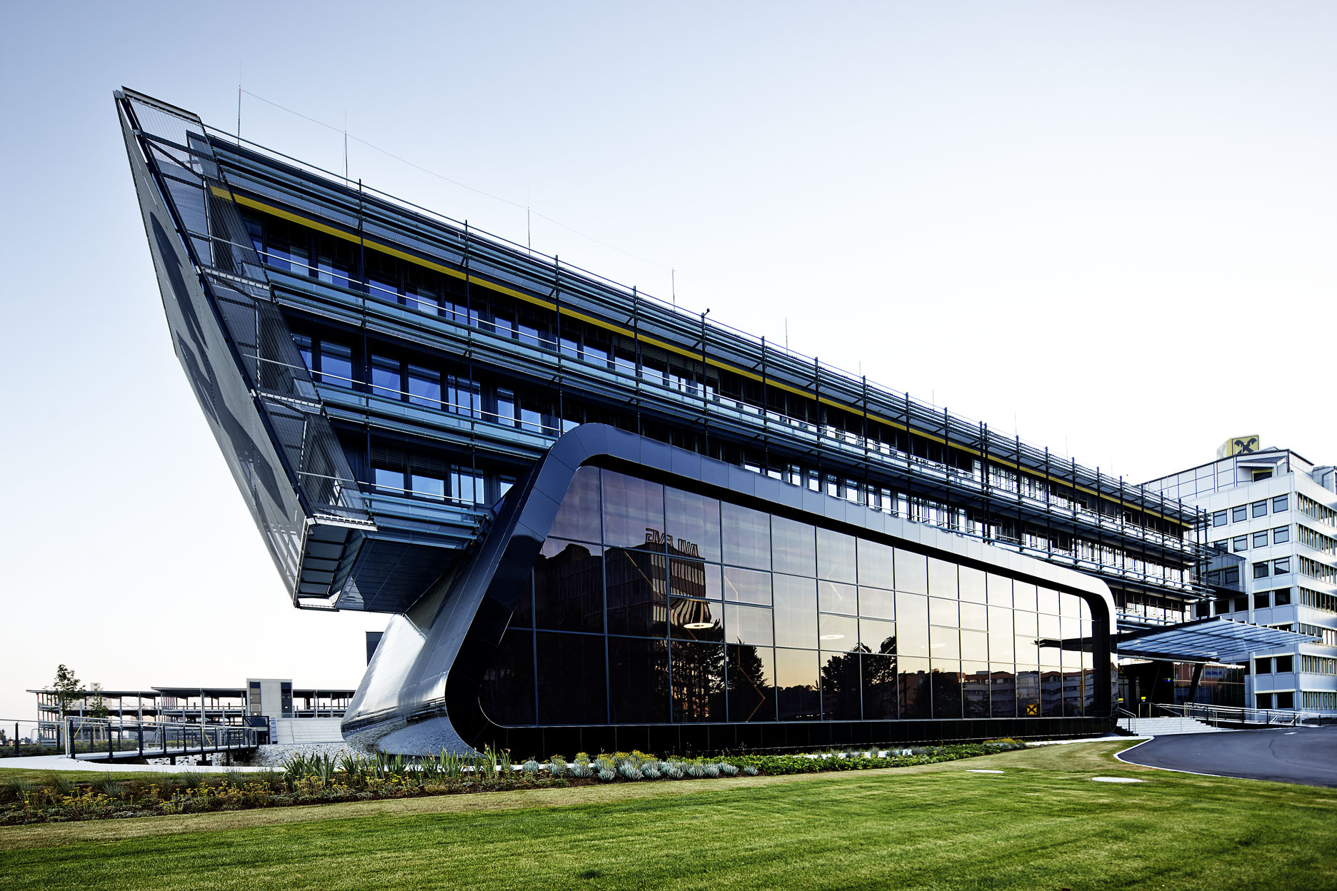 Raiffeisen Multifunktionszentrum in Raaba